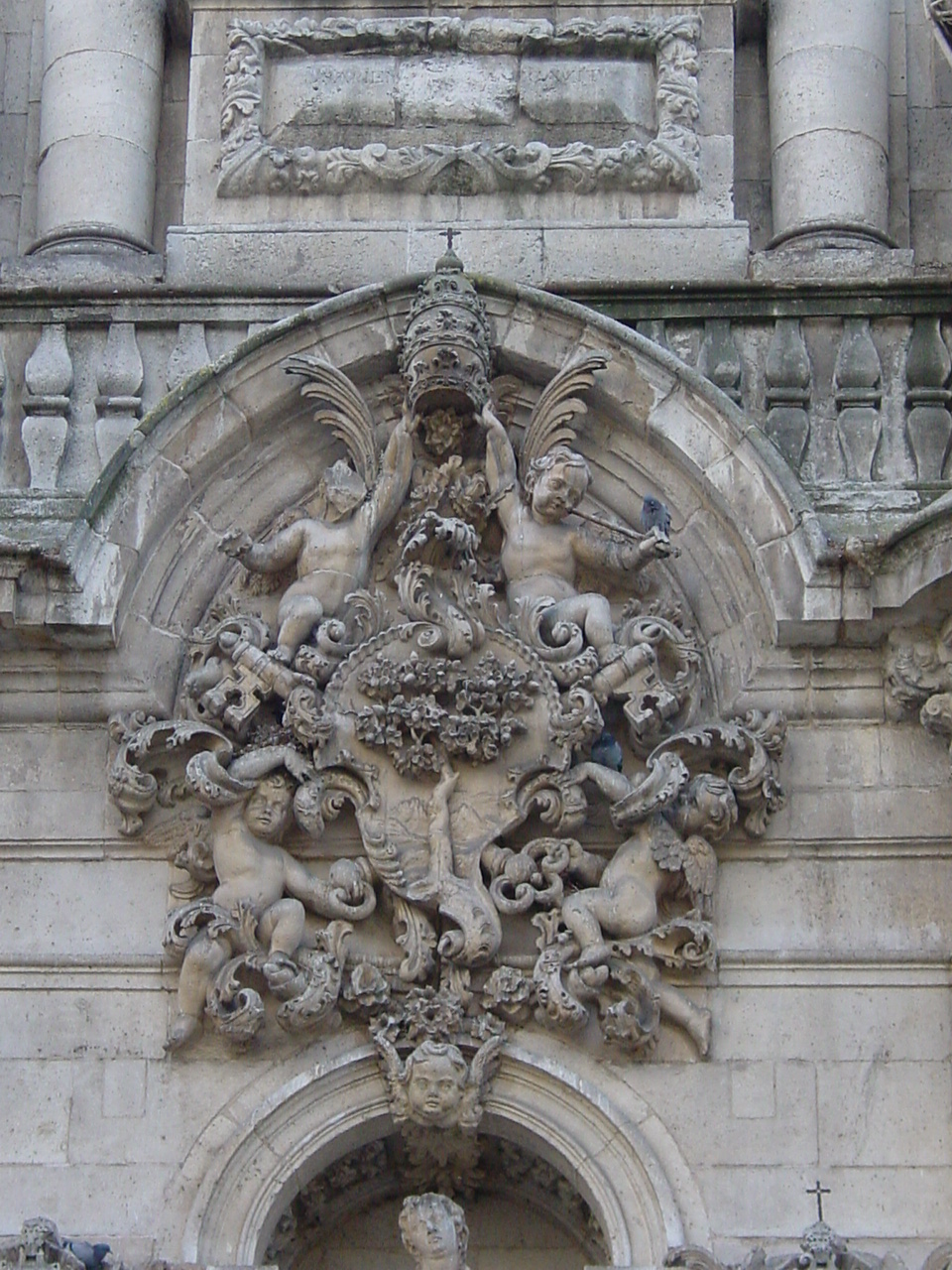 Fachada de la Universidad de Valladolid, España.